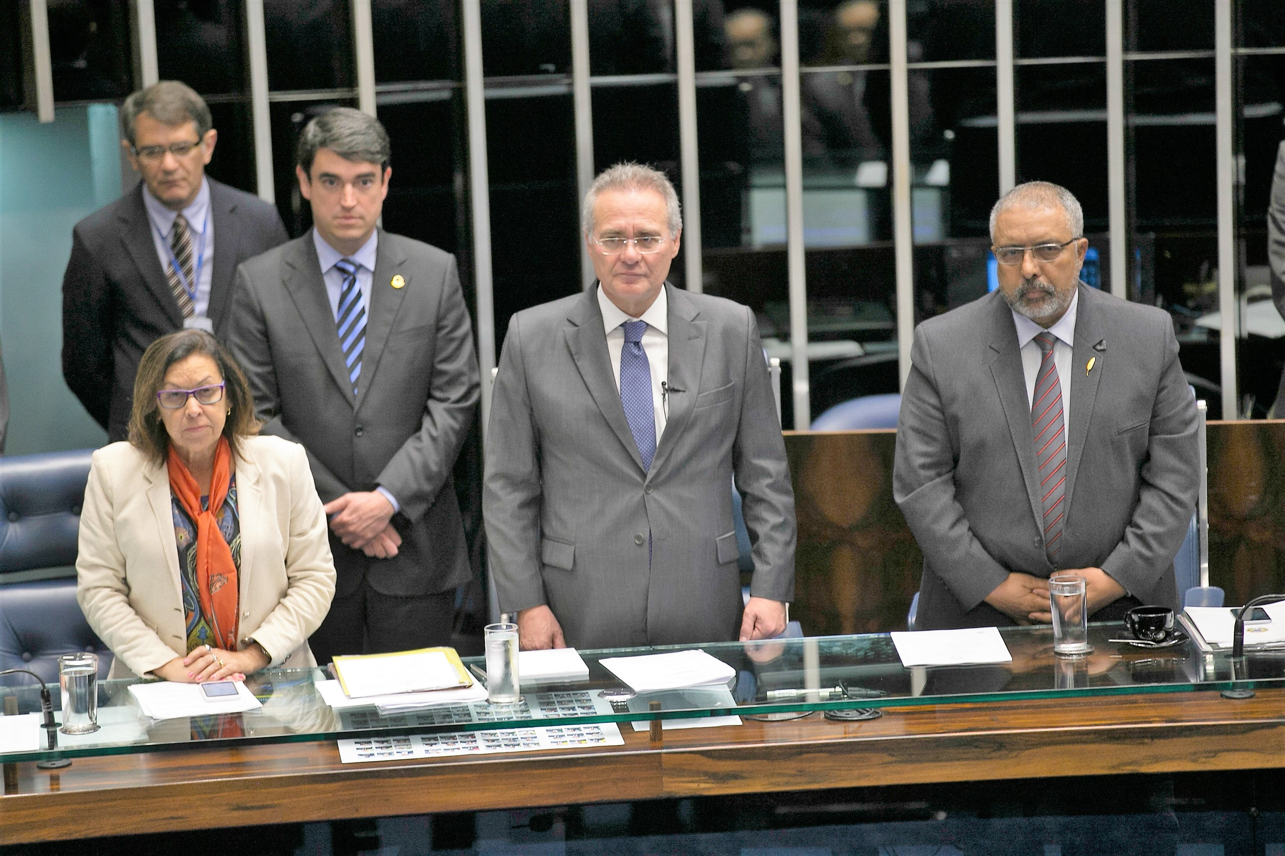 Brasília - Senadores fazem minuto de silêncio pela tragédia com os jogadores da Chapecoense, em sessão para apreciar e votar, em primeiro turno, a PEC 55/2016 (Fabio Rodrigues Pozzebom/Agência Brasil)